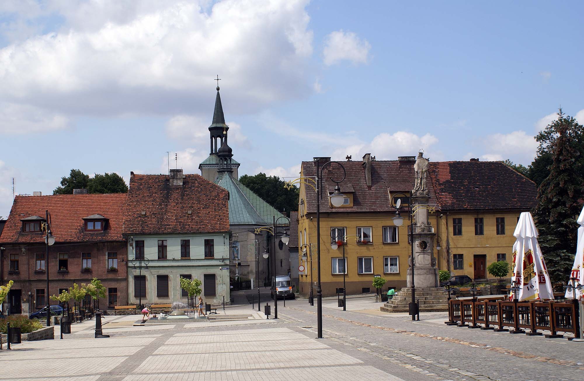 Toszek, miasto w ramach historycznego założenia